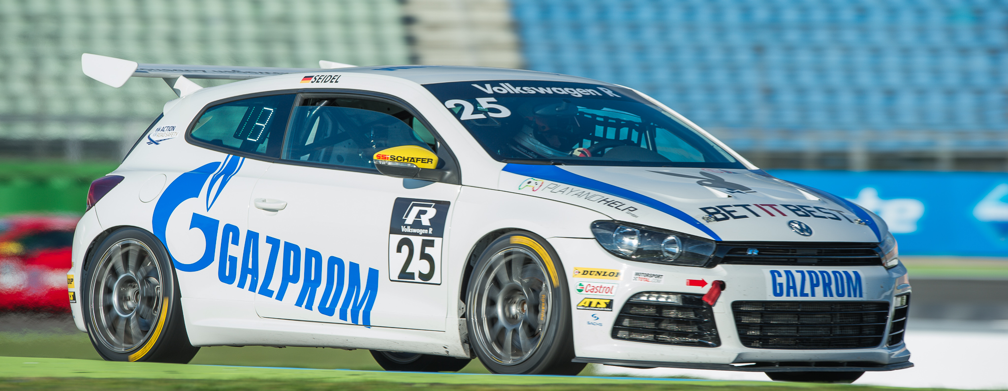 DTM,Deutsche Tourenwagen Masters,Doreen Seidel,Hockenheimring,Motorsport,VW Scirocco R-Cup,Volkswagen Scirocco R-Cup